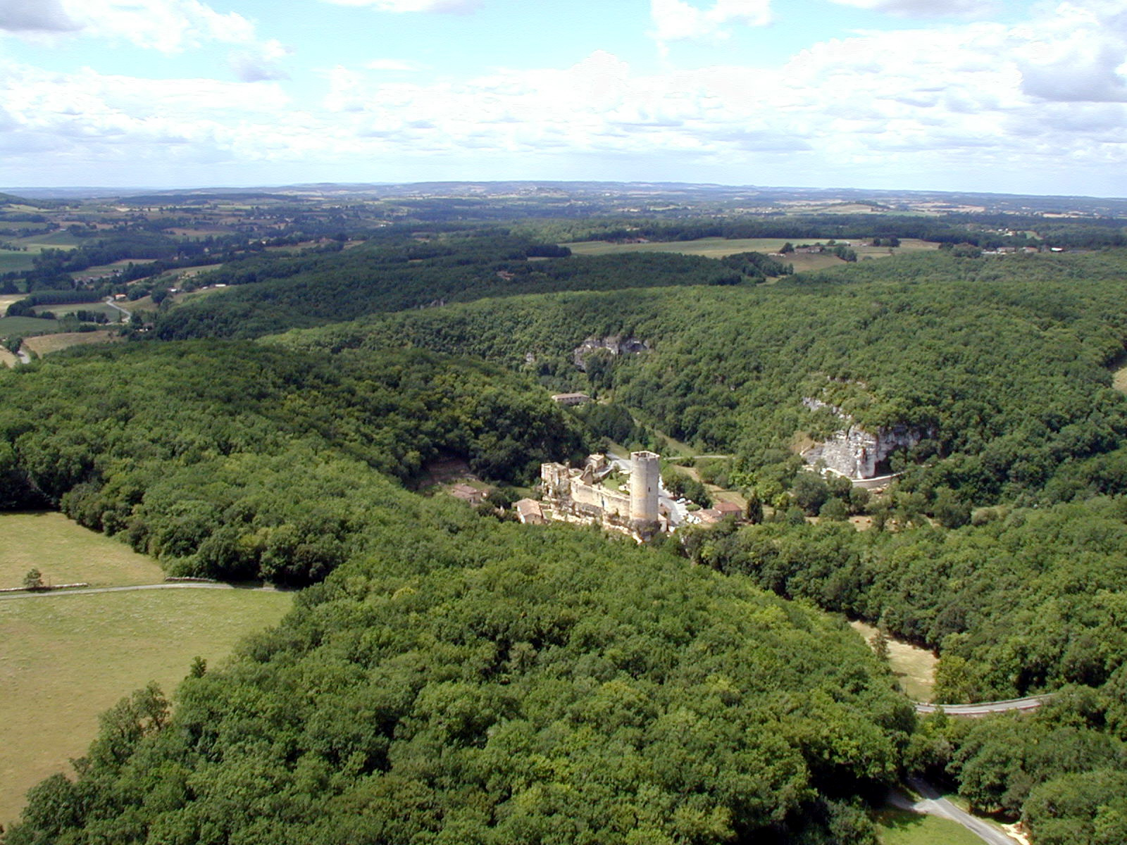 Vue aérienne de la commune de Gavaudun